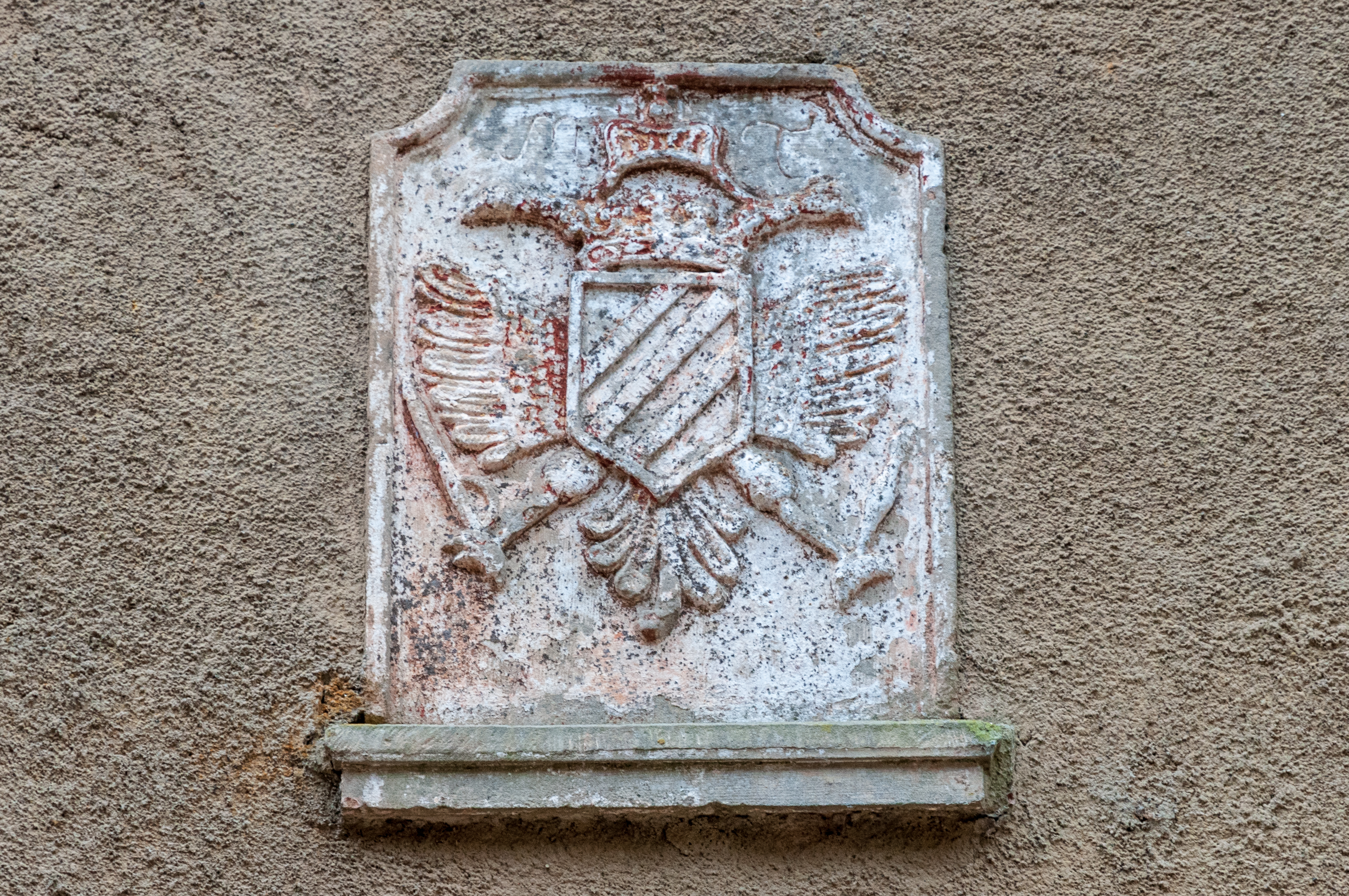 Wopen un der Bauschelter Millen."...Wopen an den Initiale vun der Keeserin Maria Teresia" (Tessy Glodt: Kierchtuermspromenaden)